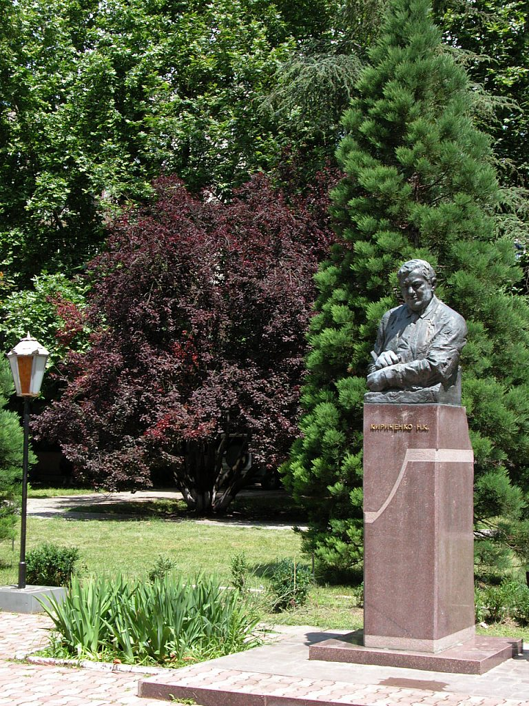 Памятник Кириченко Николаю Карповичу, c 5 апреля 1967 по 1 июля 1977 года 1-й секретарь Крымского областного комитета КП Украины Для участі фотографії в конкурсі необхідно виправити ID у відповідності до вказаного у конкурсних списках